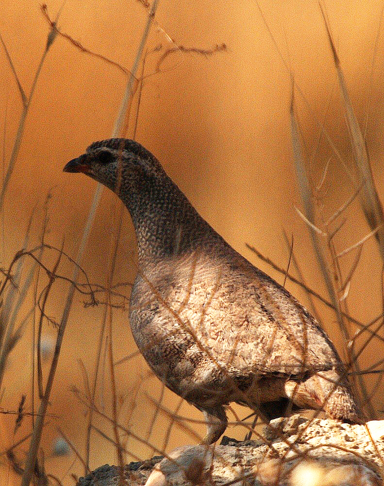 Kurdî: Li Mêrdîn hatiye kişandin. Navê îngilîzkî: See-see partridge, Navê latînkî: Ammoperdix griseogularis, Navê tirkkî: Kum kekliği… Navê Kurdî Kewê sûsik.